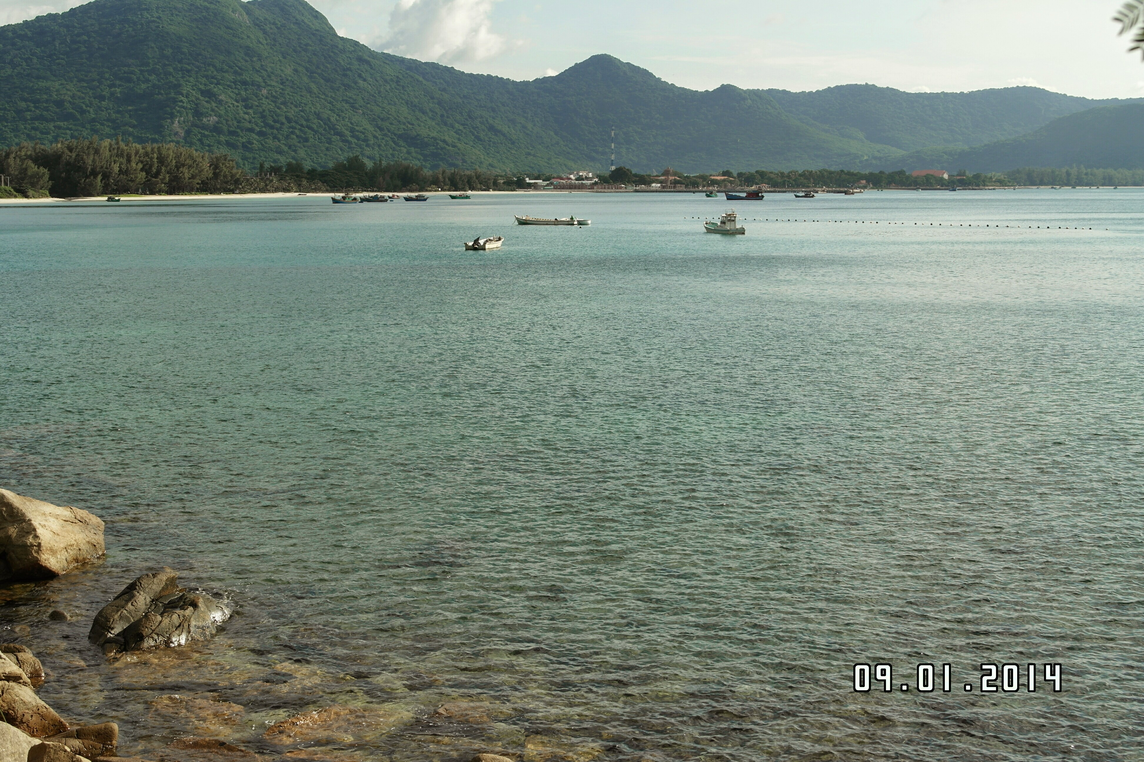 Côn Đảo, Bà Rịa - Vũng Tàu, Vietnam